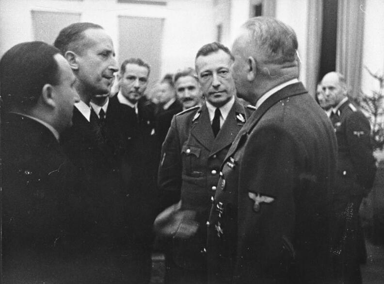 Prag, Hochschulkonferenz, v. Neurath Reichsprotektor von Neurath empfing die Hochschuldirektoren Grossdeutschlands. In Prag findet gegenwärtig eine Hochschulkonferenz statt, zu der die Direktoren aller deutschen Hochschulen zusammengekommen sind. Der Reichsprotektor, Reichsminister Freiherr von Neurath, empfing die 58 Hochschuldirektoren im Czernin-Palais - Unser Bild zeigt Reichsprotektor Freiherrn von Neurath im Gespräch mit den Hochschuldirektoren. Links neben ihm Ministerialdirektor, SS-Oberführer Mentzel vom Reichserziehungsministerium, der dem Reichsprotektor die Direktoren vorstellte. Scherl Bilderdienst, Berlin 18.12.40 [Prag.- Hochschuldirektorenkonferenz, Direktoren, Prof. Dr. Rudolf Mentzel, Konstantin Freiherr von Neurath] Abgebildete Personen: Neurath, Konstantin von Freiherr: Außenminister, Reichsprotektor für Böhmen und Mähren, Deutschland (PND 118786016) Mentzel, Rudolf Prof. Dr.: SS-Oberführer, Präsident der Deutschen Forschungsgemeinschaft, Deutschland